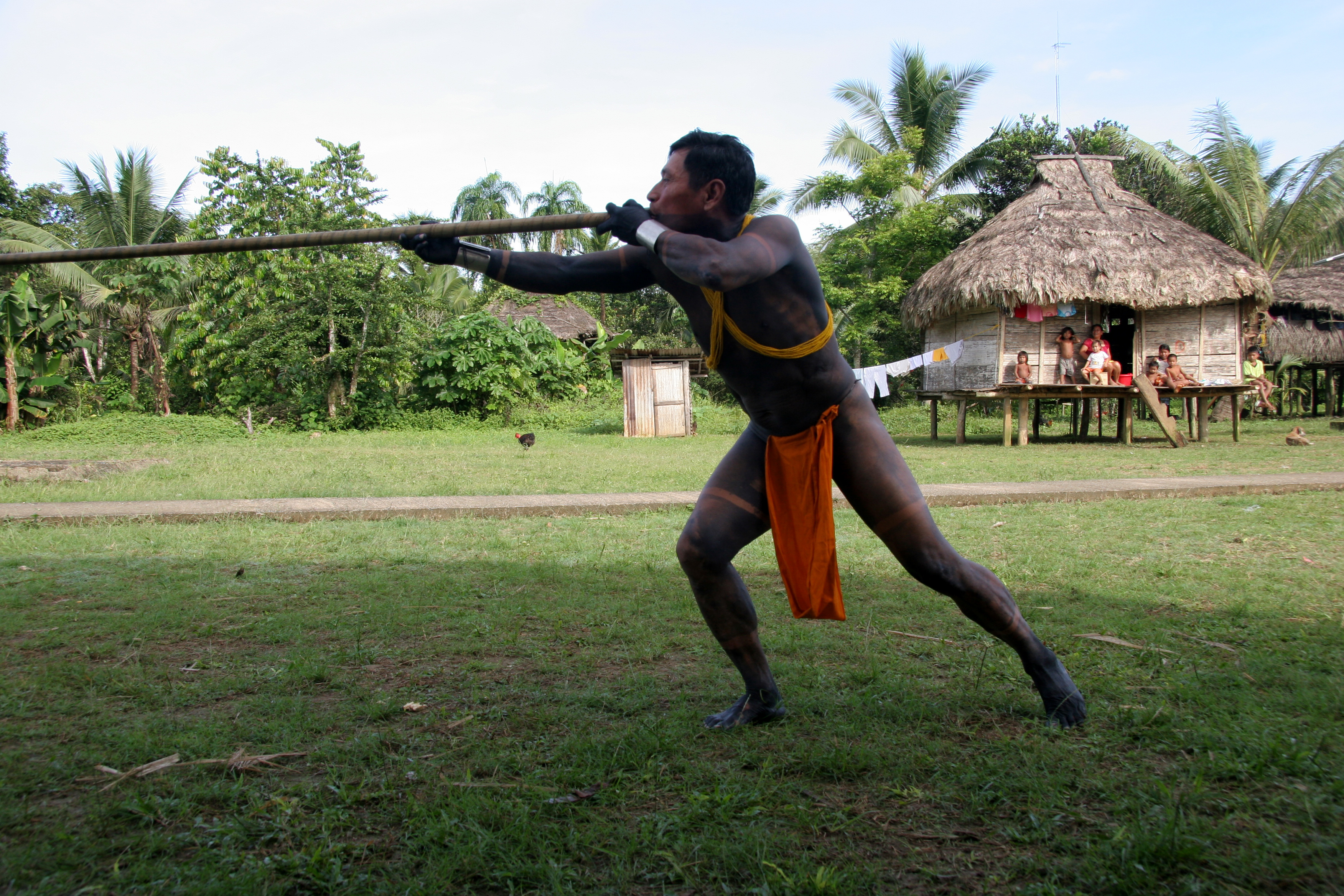 panama, Darien, démonstration de tir à la sarbacane par un Embera